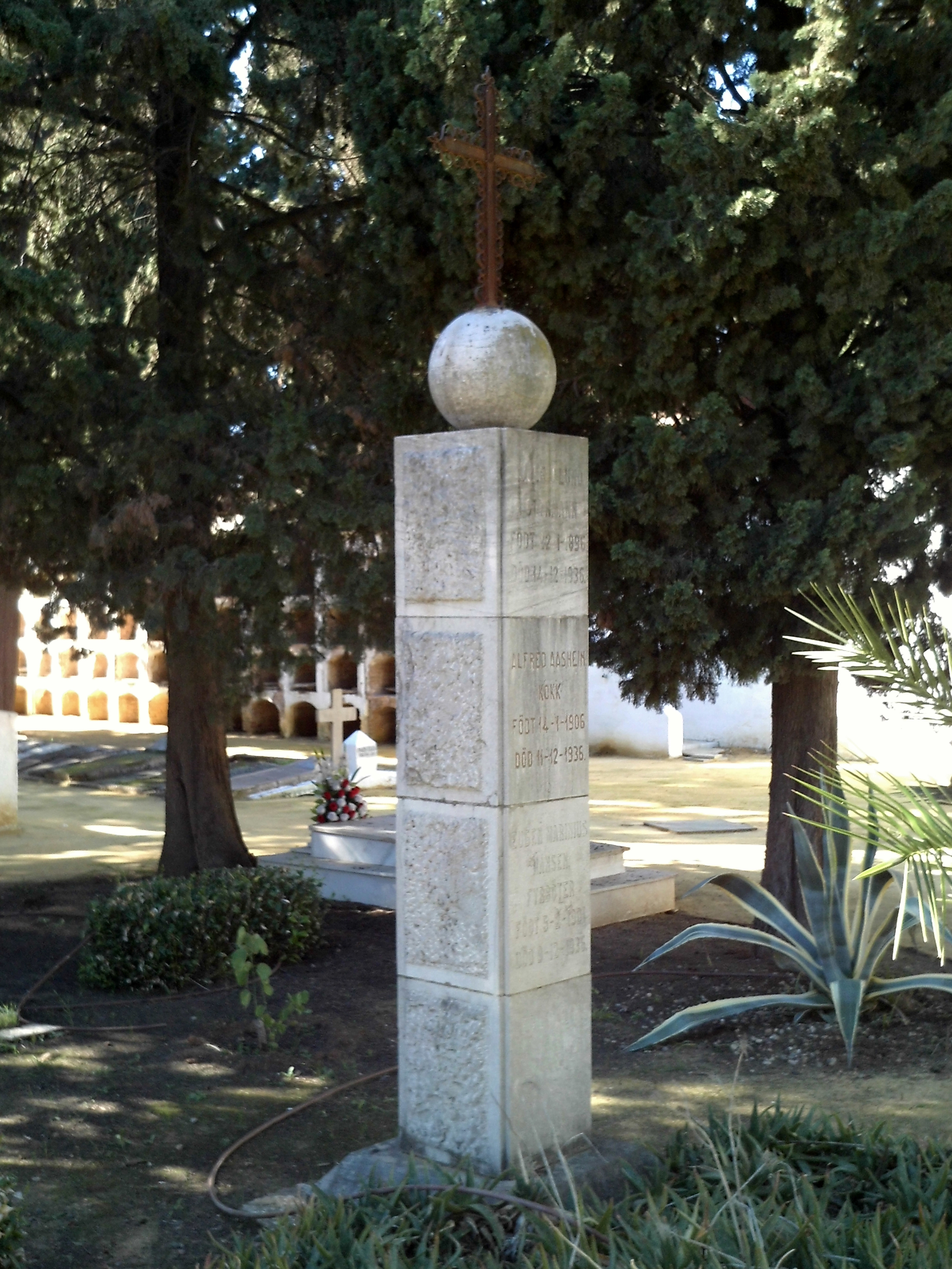 Monumento funerario dedicado a los marineros del Gulnes. 1938. Cementerio de San Fernando. Sevilla, Andalucía, España.